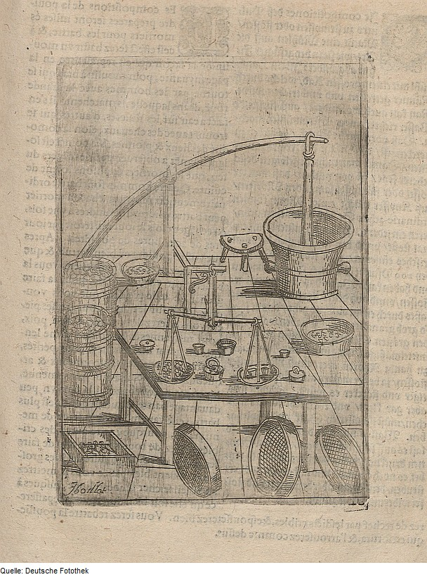 Original image description from the Deutsche Fotothek Kriegskunde & Pyrotechnik & Waage & Salpeter & Schwefel & Pulver